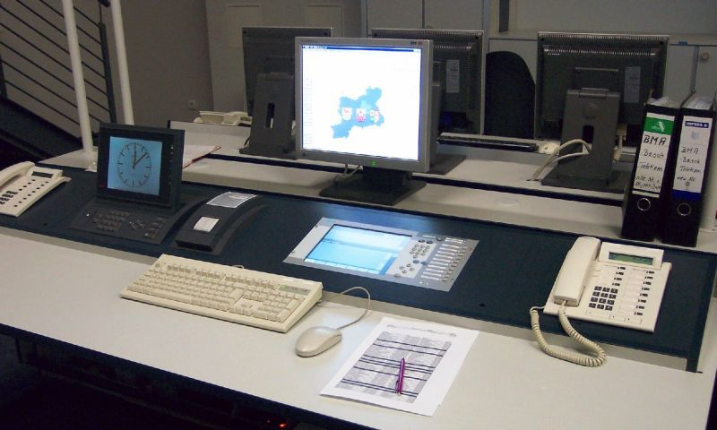 Regionalleitstelle Lausitz - Arbeitstisch der aufgeschalteten Brandmeldeanlagen